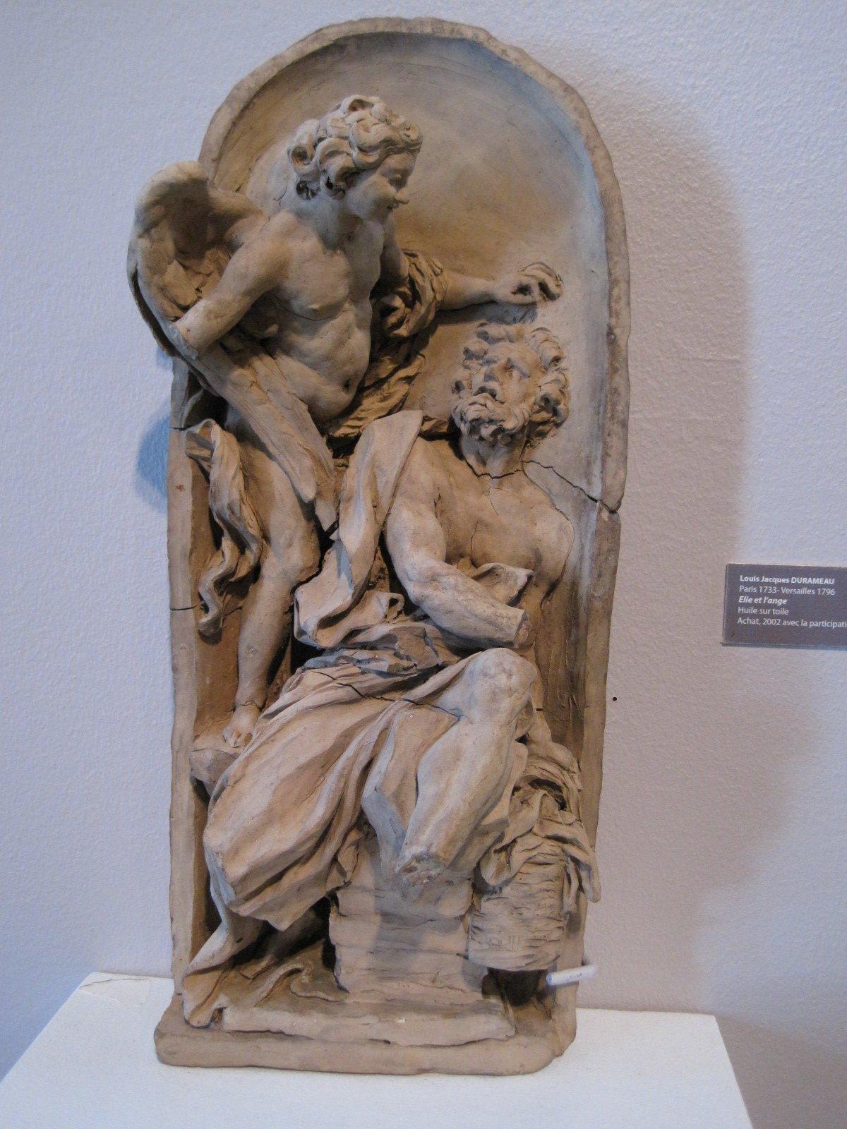 Habacuc et l'ange - Terre cuite par Luc Breton - Musée des Beaux-Arts de Besançon